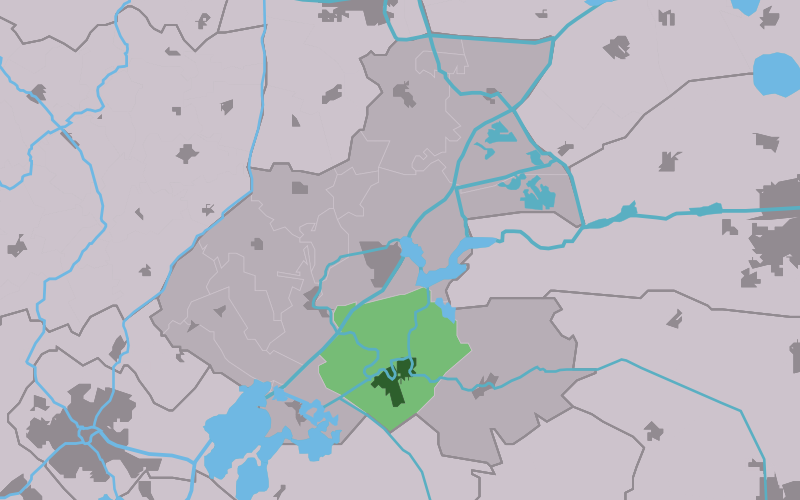 Kaartsje fan himrik fan Akkrum